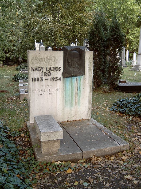 Nagy Lajos sírja Budapesten. Kerepesi temető: 34/2-1-2 (Vigh Tamás szobrász műve).